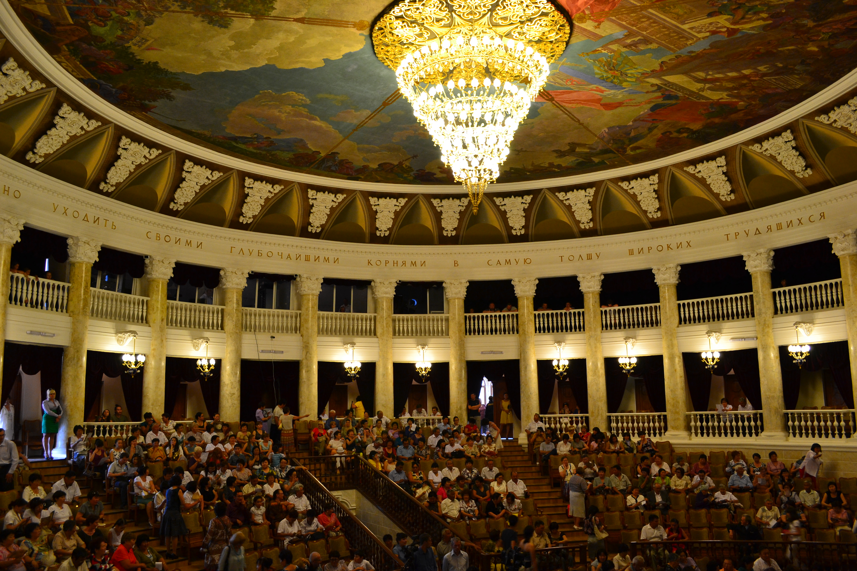 Зрительный зал Бурятского государственного академического театра оперы и балета.